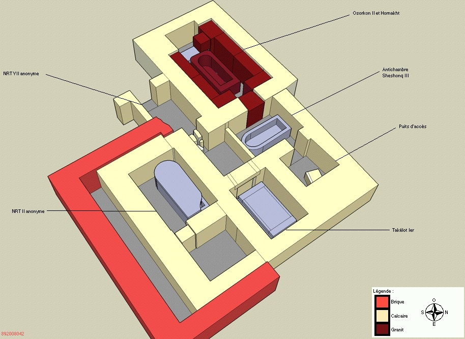 Vue en élévation des tombes NRT I, NRT II et NRT VII - Nécropole royale de Tanis